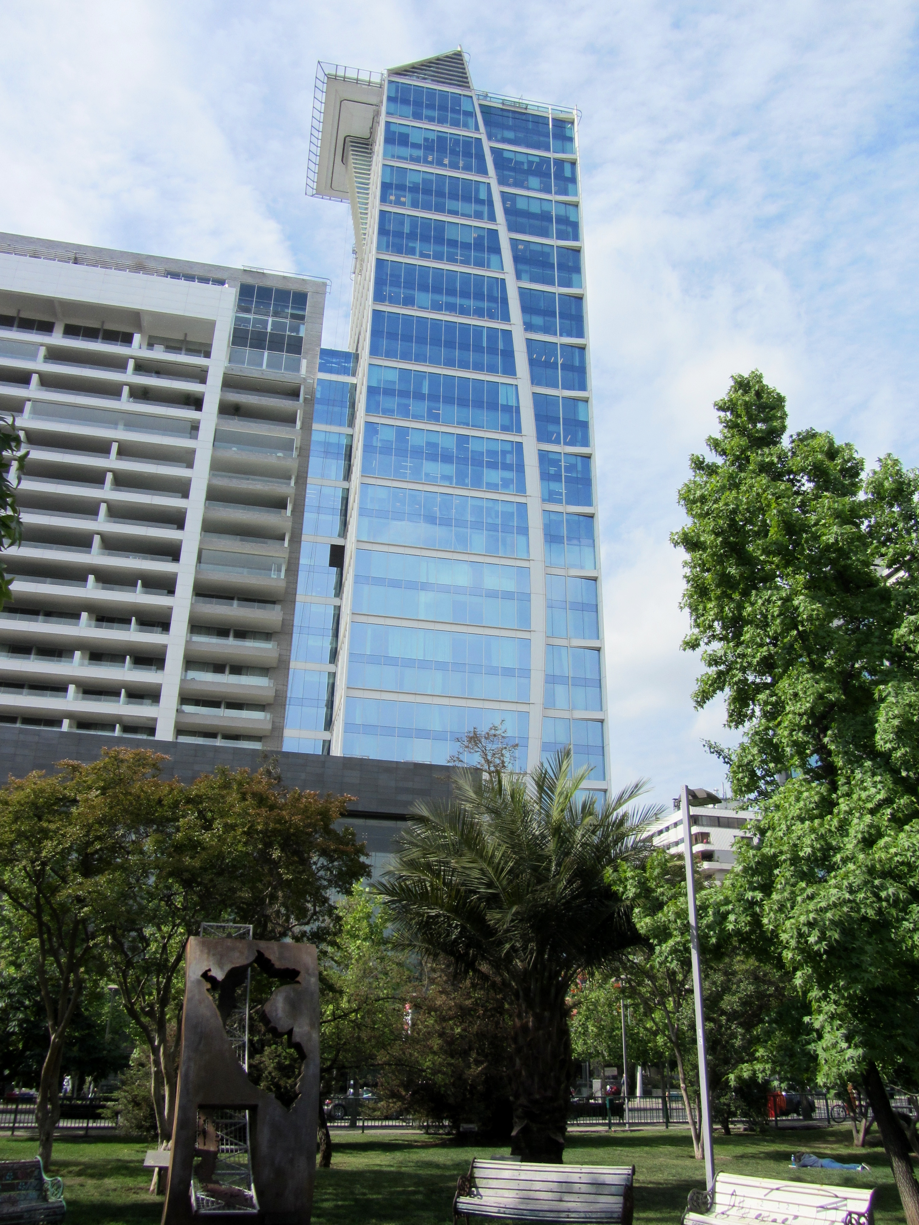 Escultura a la integración chileno-peruana en la Plaza Perú, avenida Isidora Goyenechea. Al frente, en la esquina de esta avenida con Augusto Leguía Norte, el Territoria 3000 con el rascacielos del Hotel W.